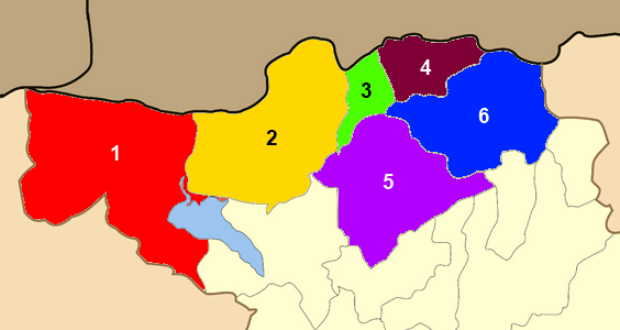 Χάρτης των δημοτικών ενοτήτων (πρώην δήμων και κοινοτήτων) του Δήμου Σιντικής.